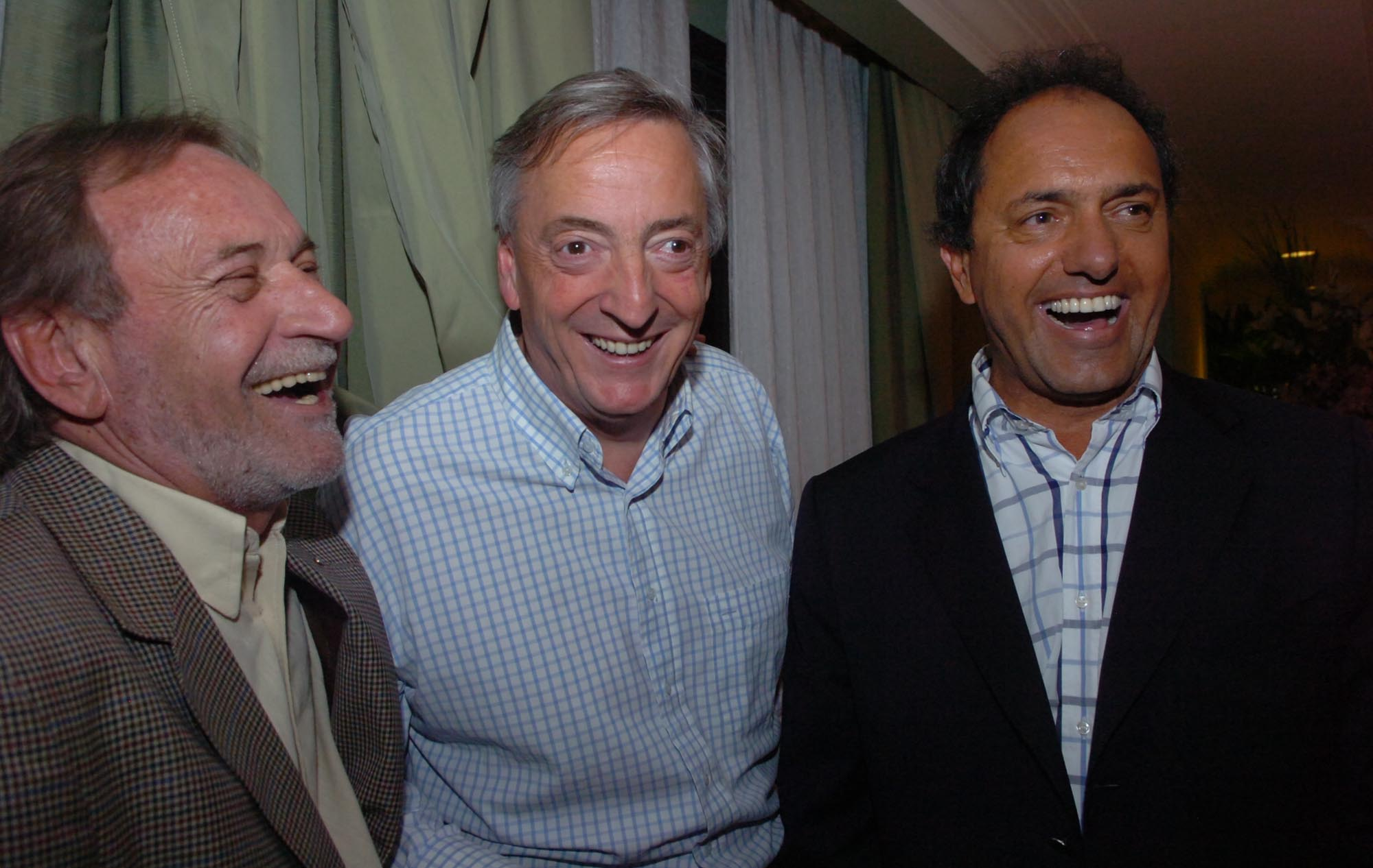 Daniel Scioli, Kirchner y Alberto Balestrini